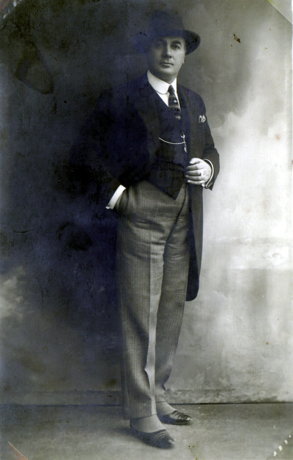 Il Detective Giuseppe Visco GIlardi in una foto d'epoca.